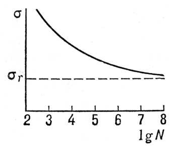 Material endurance graph